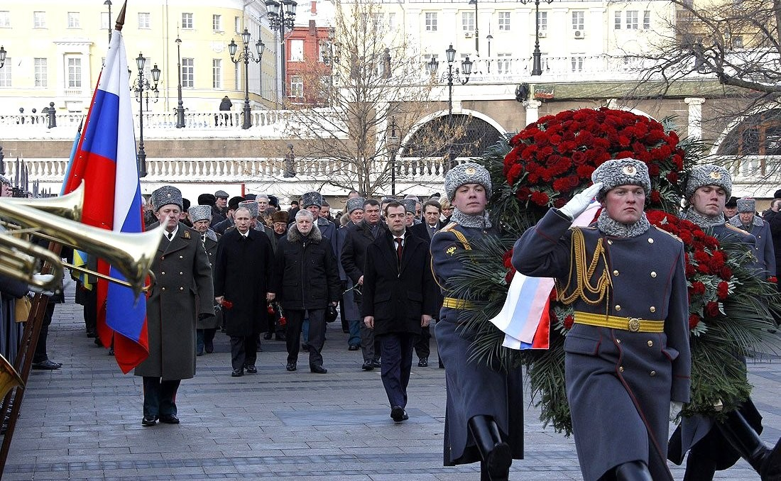 Den Dmitri Medwedew leet 2011 um Dag vum Verdeedeger vun der Heemecht e Kranz Blummen op d'Graf vum Onbekannten Zaldot.